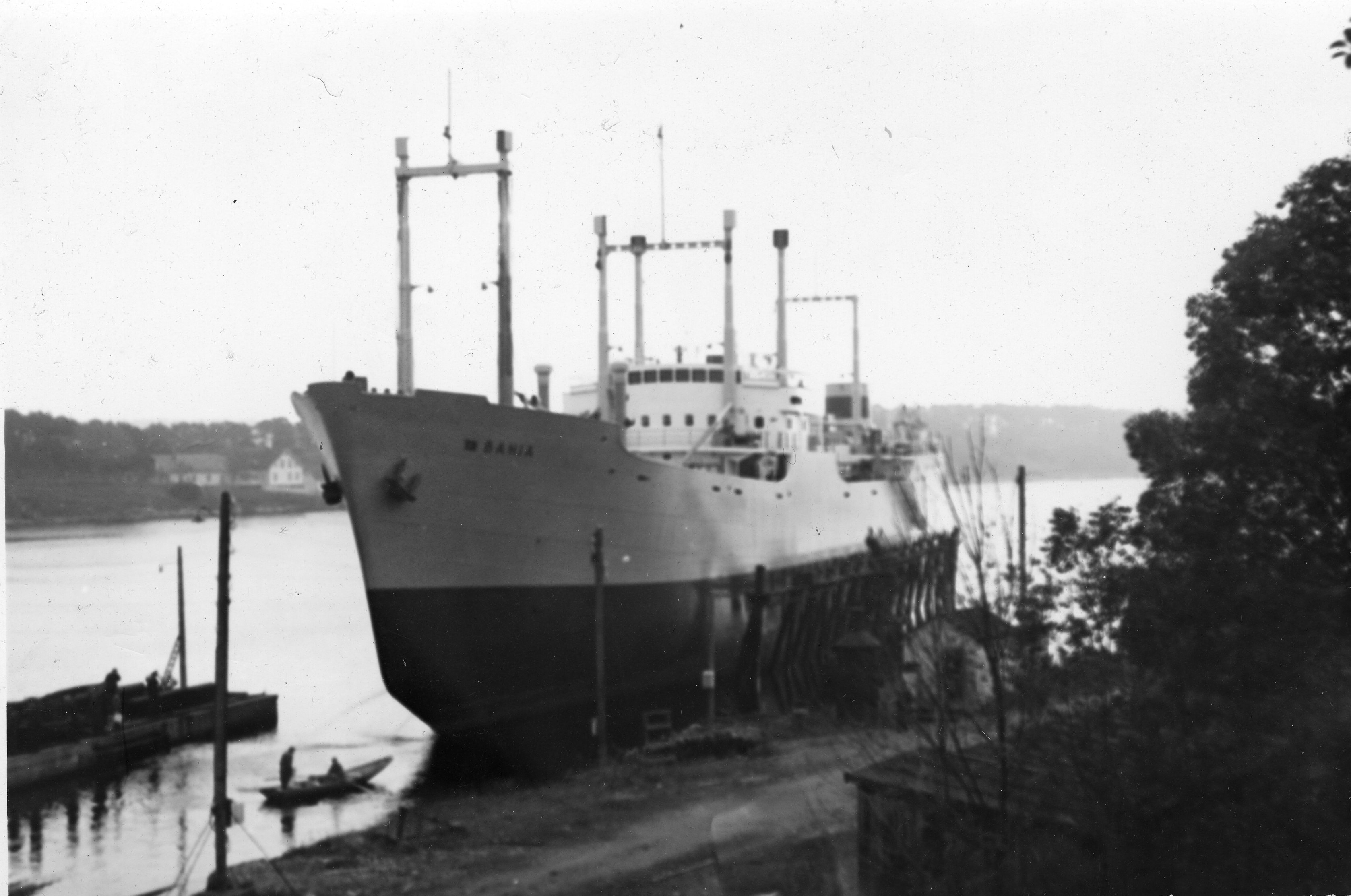 Motorskipet Bahia ved slippen